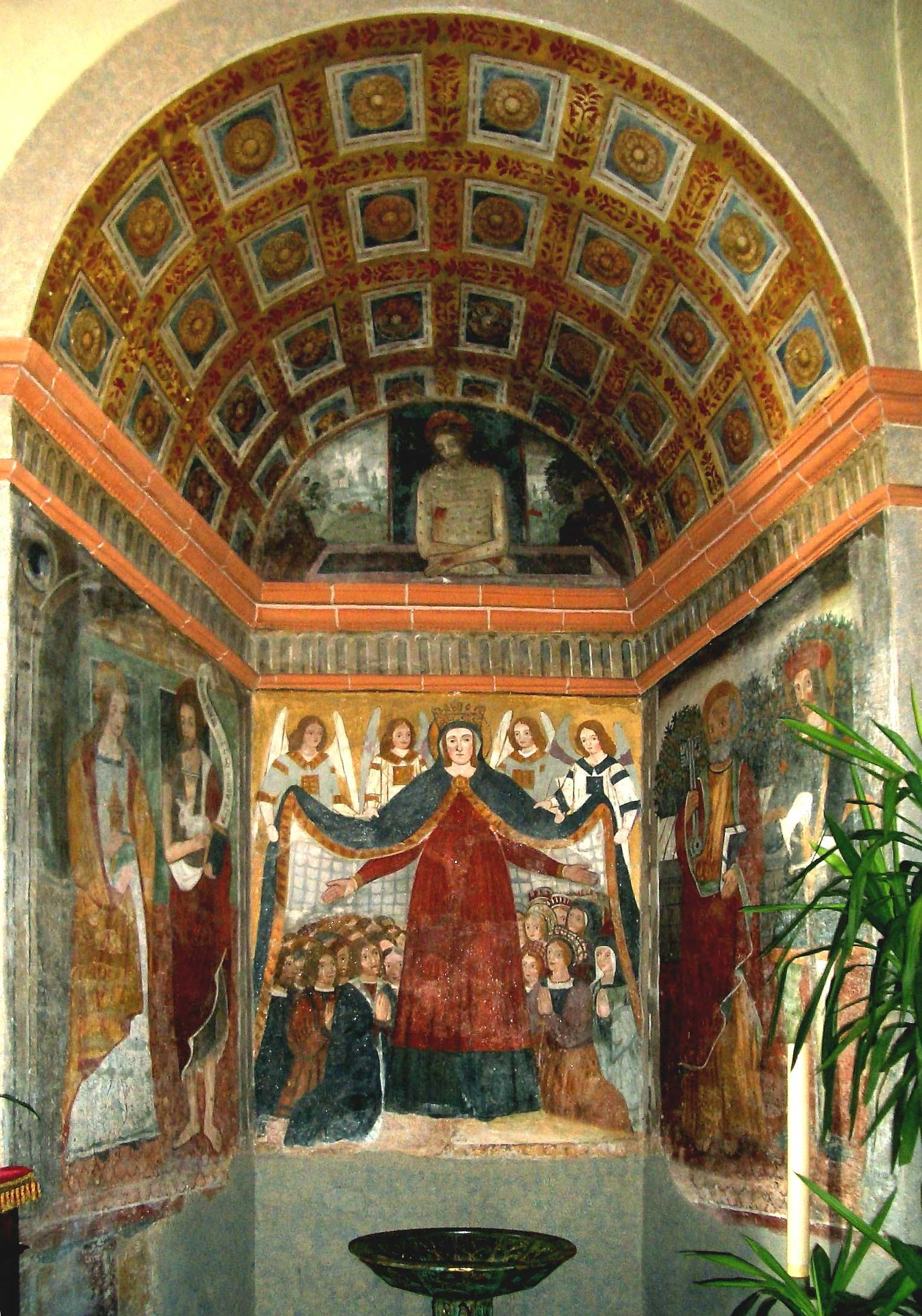 Gaspare da Ponderano, Madonna of Mercy and Pietà, XVI century, St Peter church, Benna (Biella), Italy